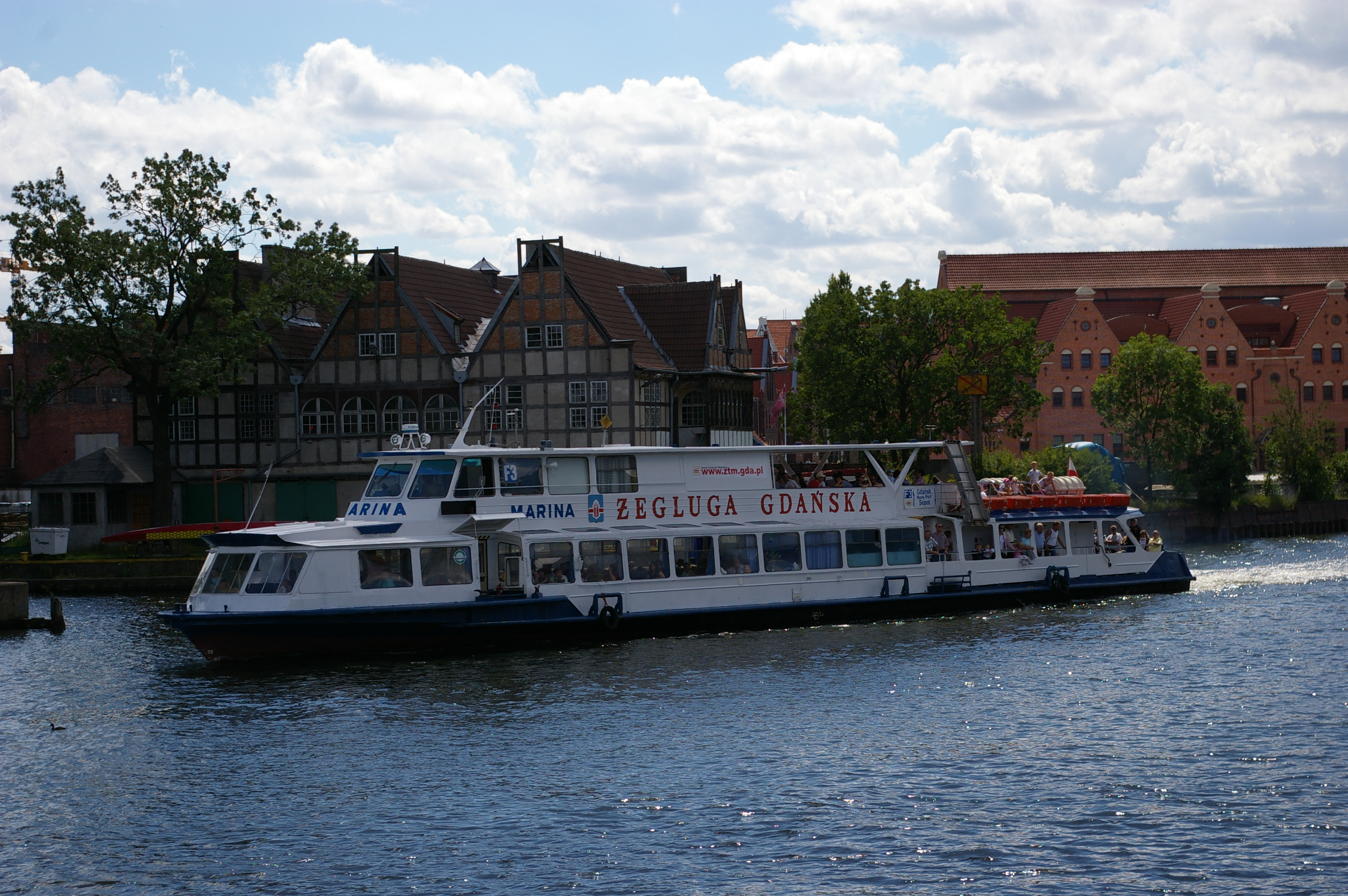 Statek wycieczkowy Marina na Mołtawie mijający Filharmonię Bałtycką